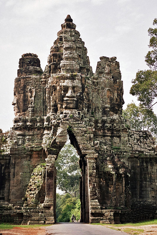 La Porta Sud d'Angkor Thom des de l'interior. Angkor, Cambodja